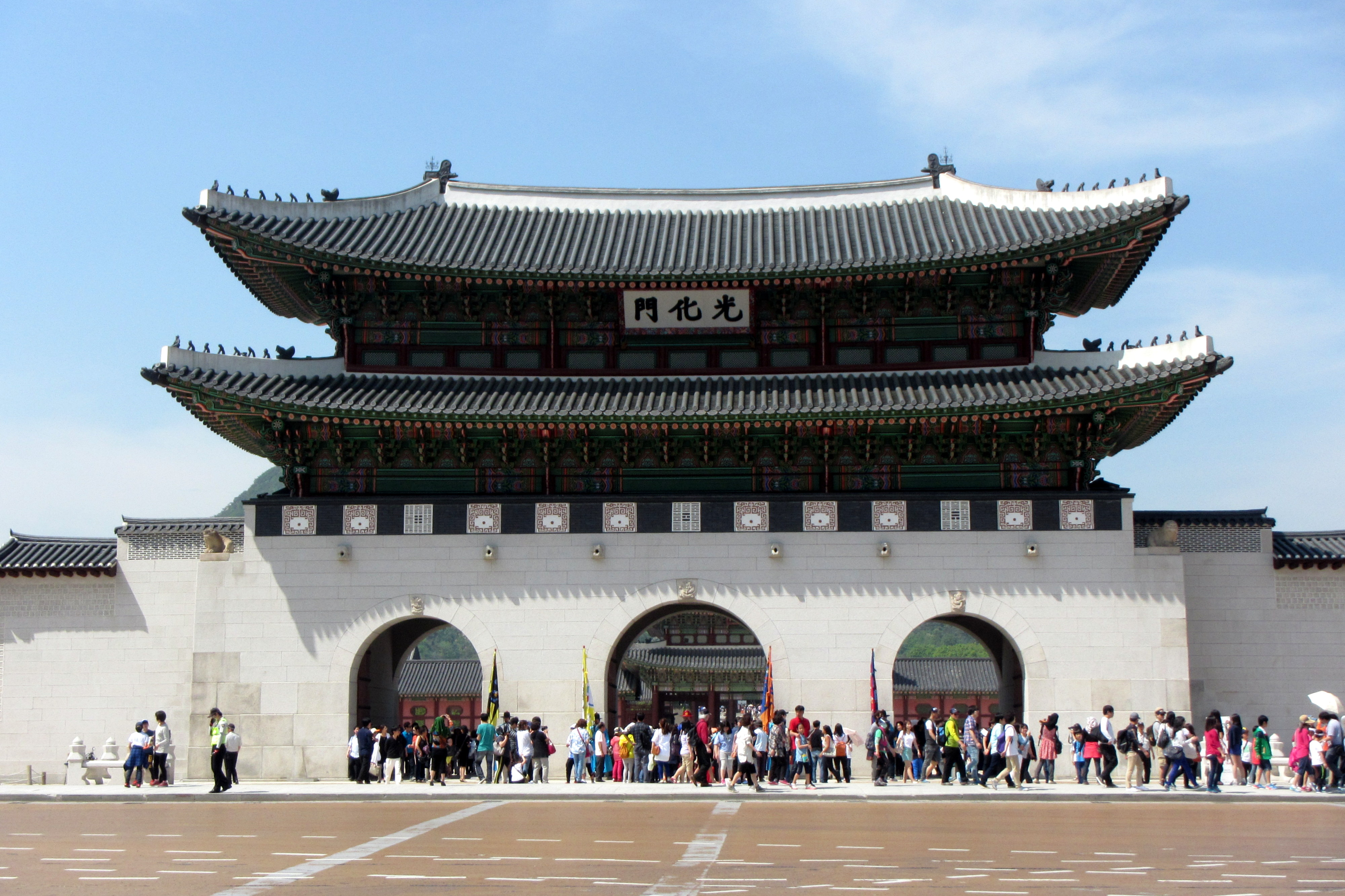 광화문 Gwanghwamun 光化門